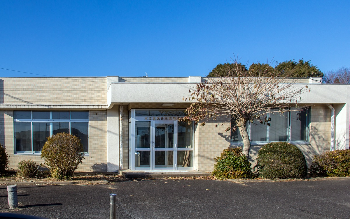 本三里塚共同利用施設